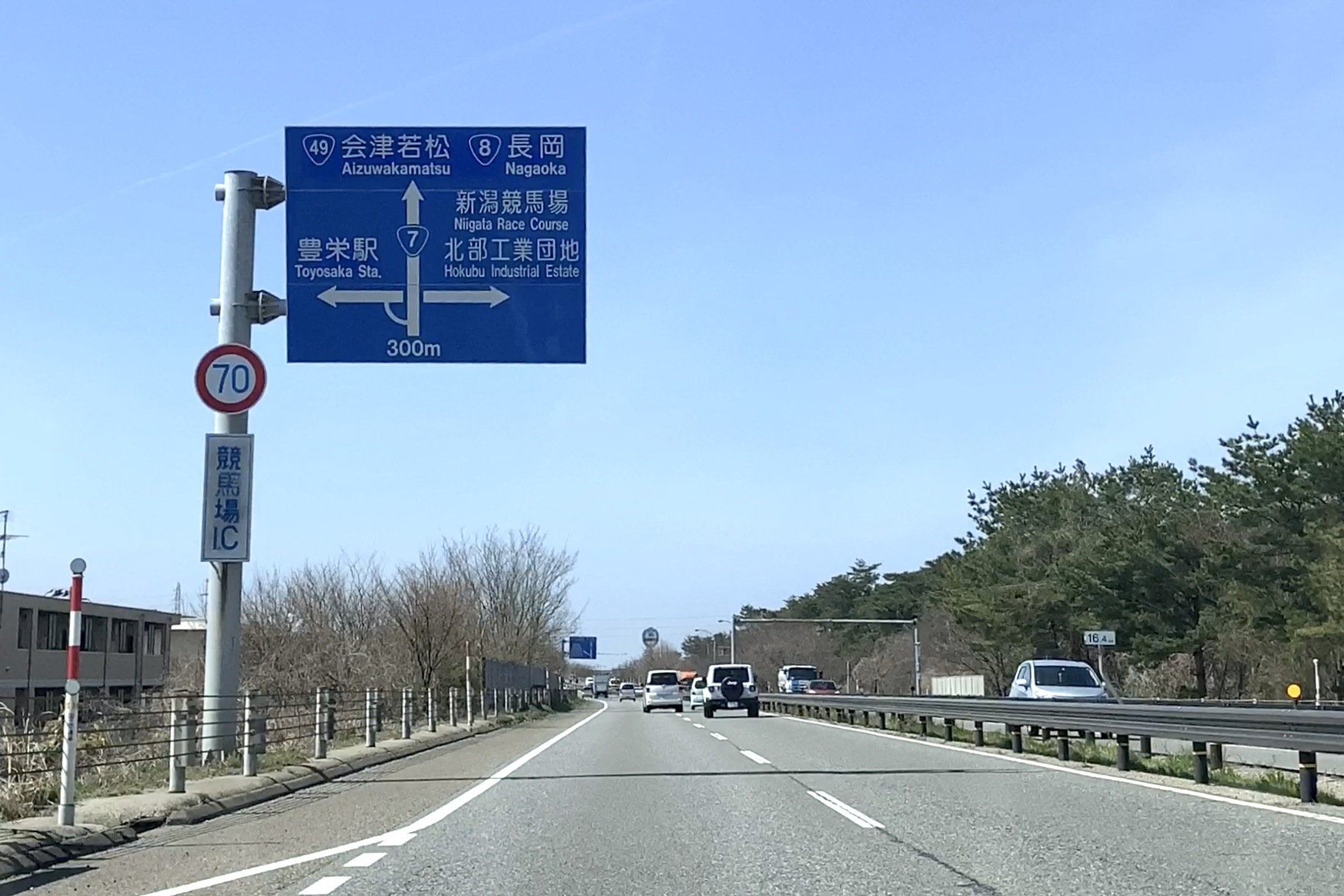 新新バイパス・競馬場インターチェンジ（2020年3月）